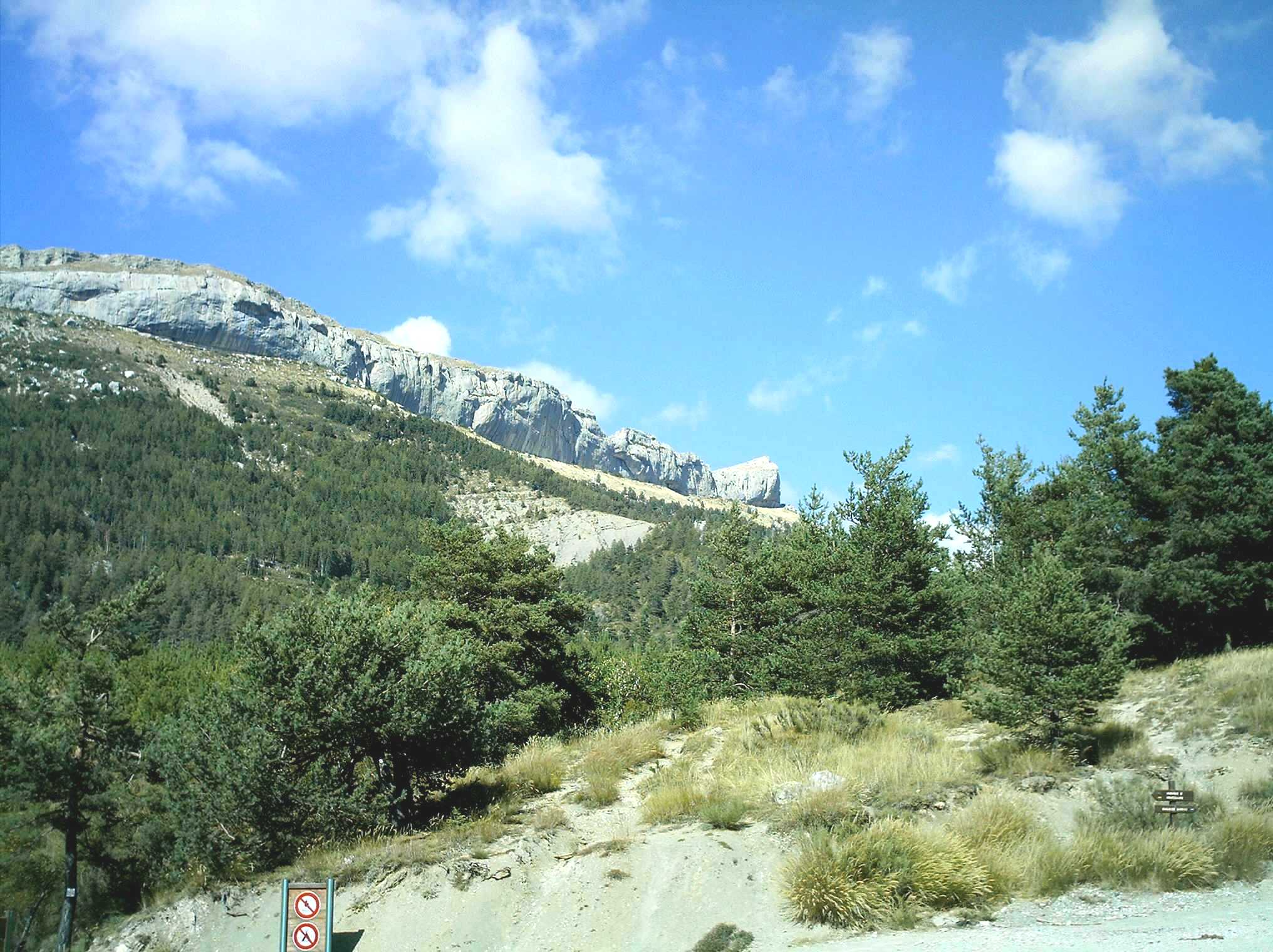 Vue du versant sud de la corniche de Céüse depuis le col des Guérins( 1312m). Départ de la piste forestière de Châtillon le Désert.